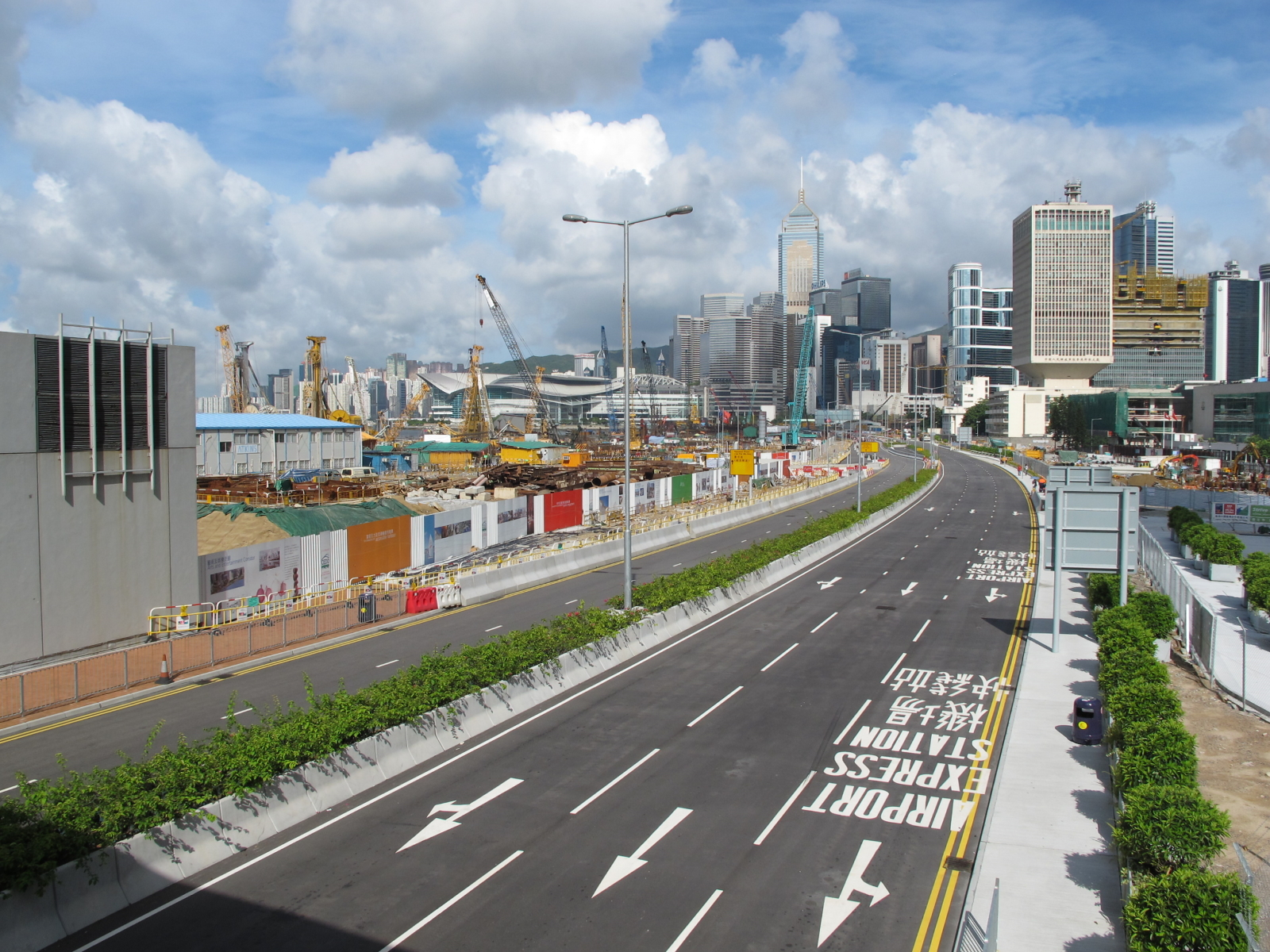 龍和道 Lung Wo Road